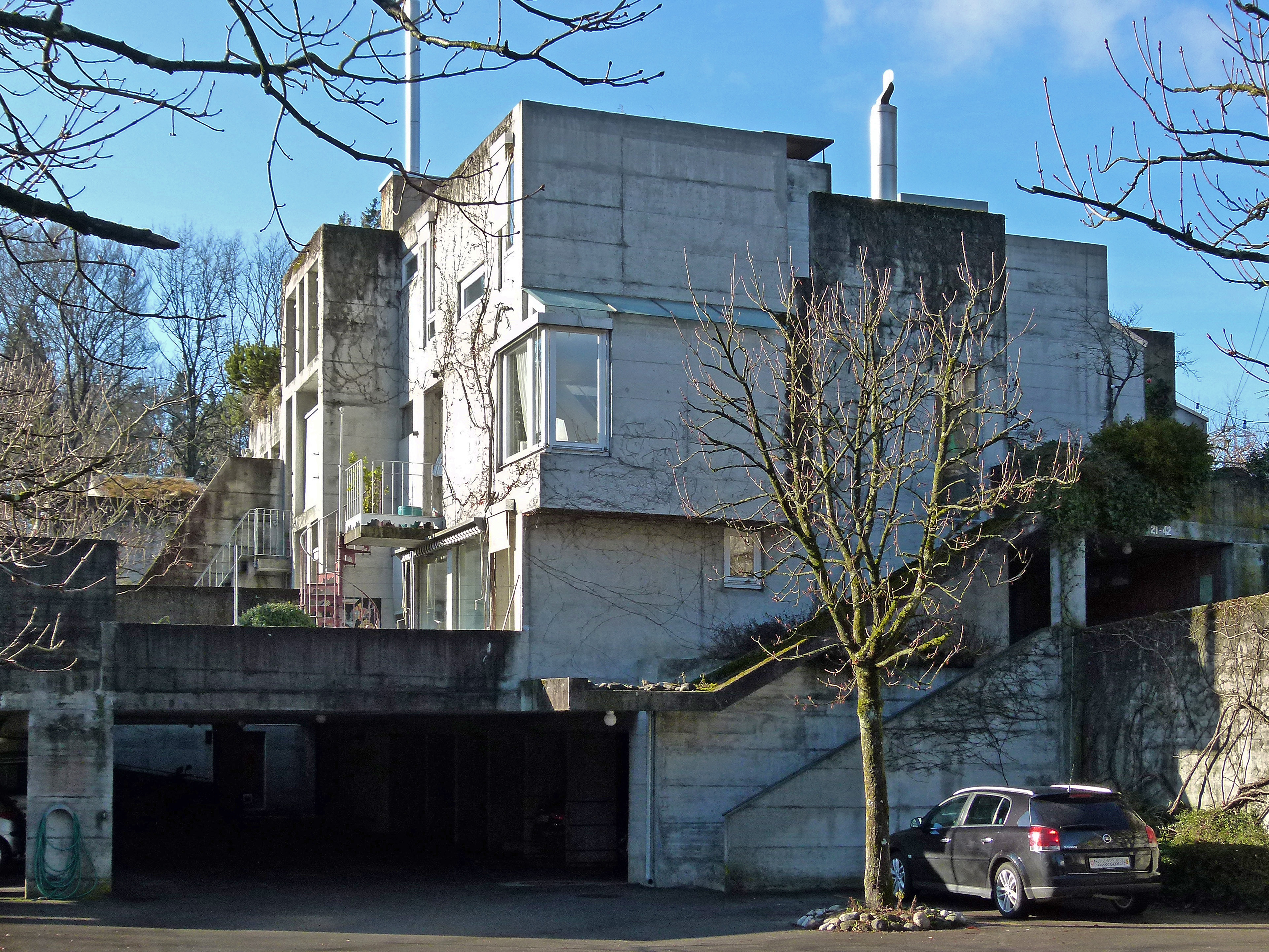 Siedlung Thalmatt1, Herrenschwanden, Atelier5, 1967-1974